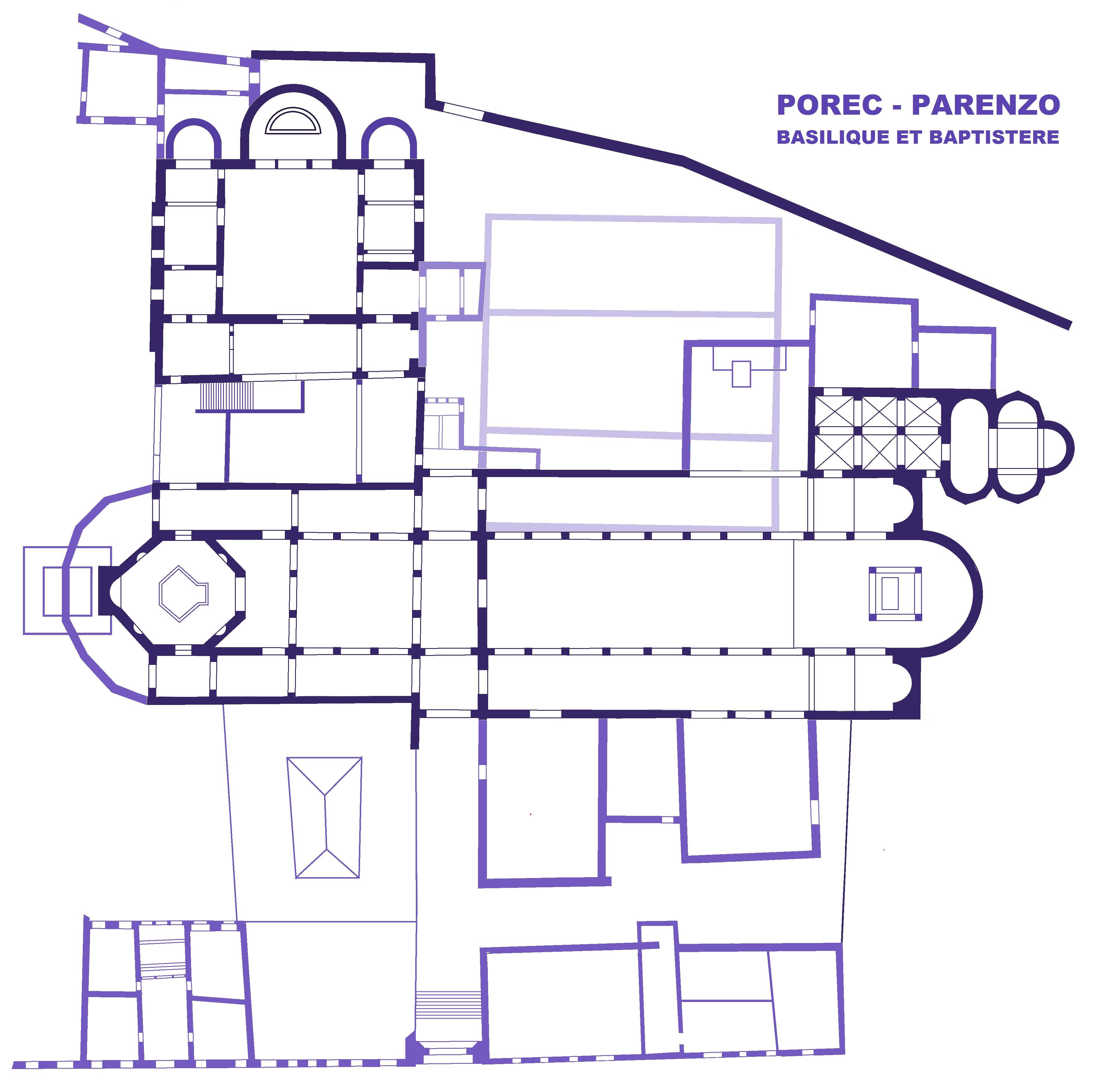 Porec, plan basilique euphrasienne de Parenzo